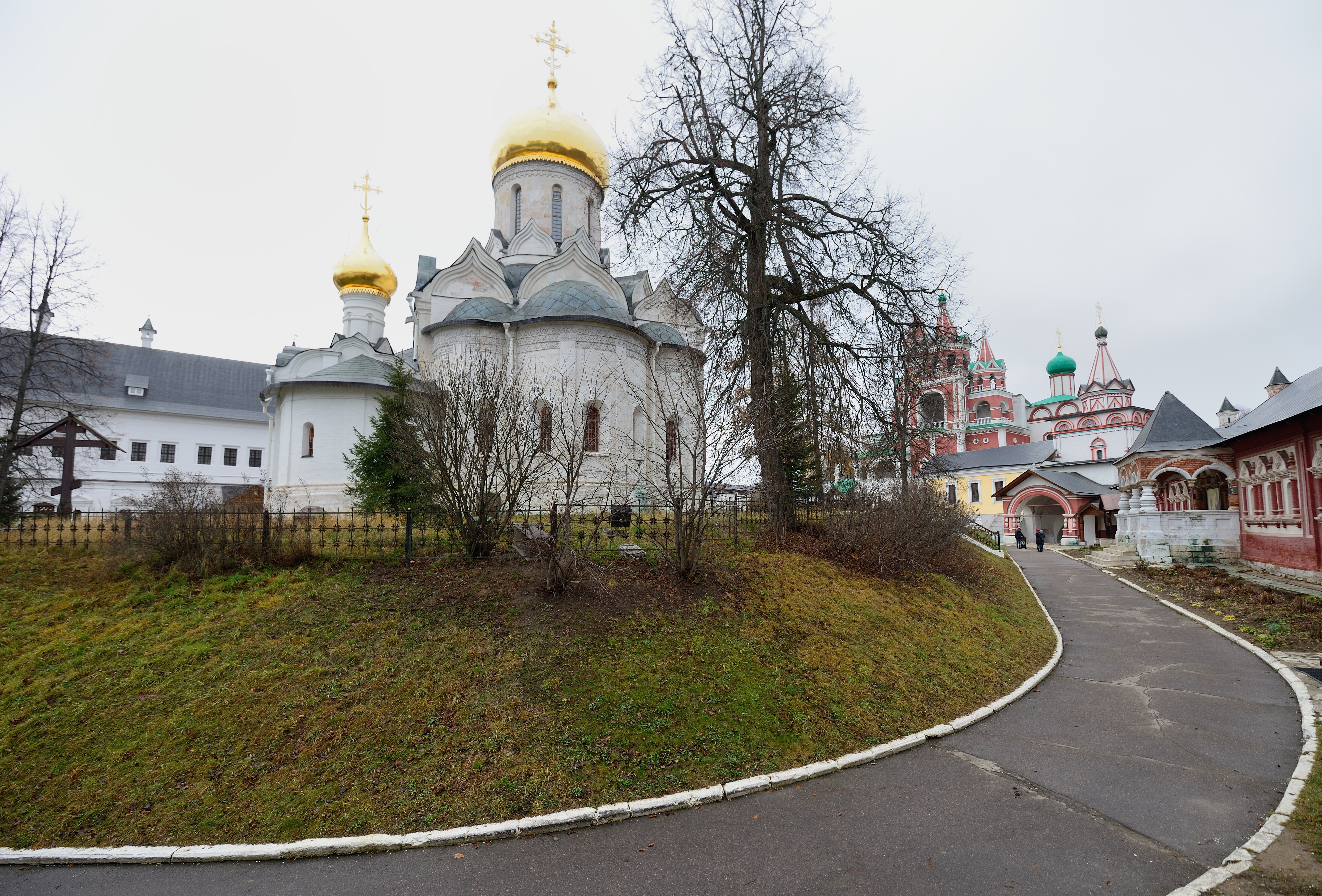 Вид на Собор Рождества Пресвятой Богородицы и царицыны палаты Саввино-Сторожевского Ставропигиального мужского монастыря